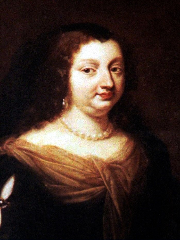 Angélique Faure de Bullion, était l'épouse de Claude Bullion, surintendant des finances de France. Elle hérite d'une grande fortune à la mort de son mari et devient la bienfaitrice, anonyme, de Jeanne Mance et de l'Hôtel-Dieu.